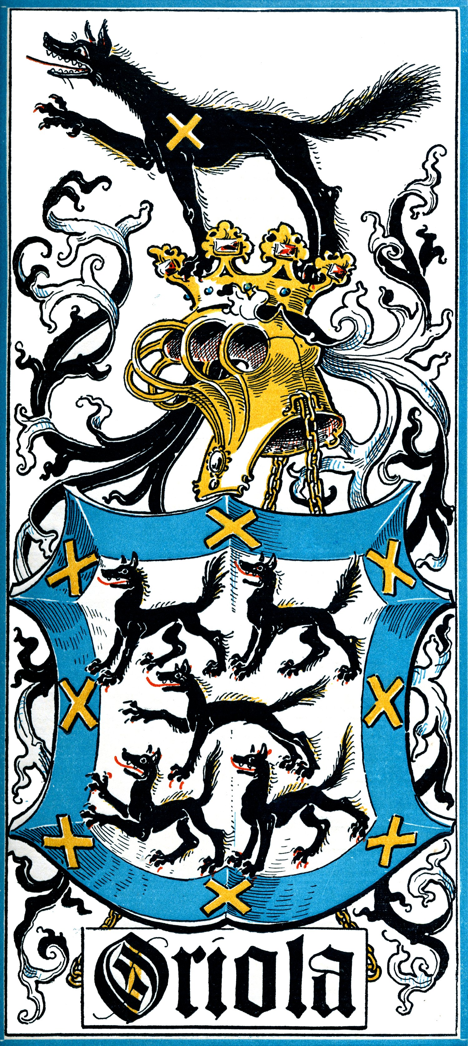 Stammwappen derer Grafen von Oriola.